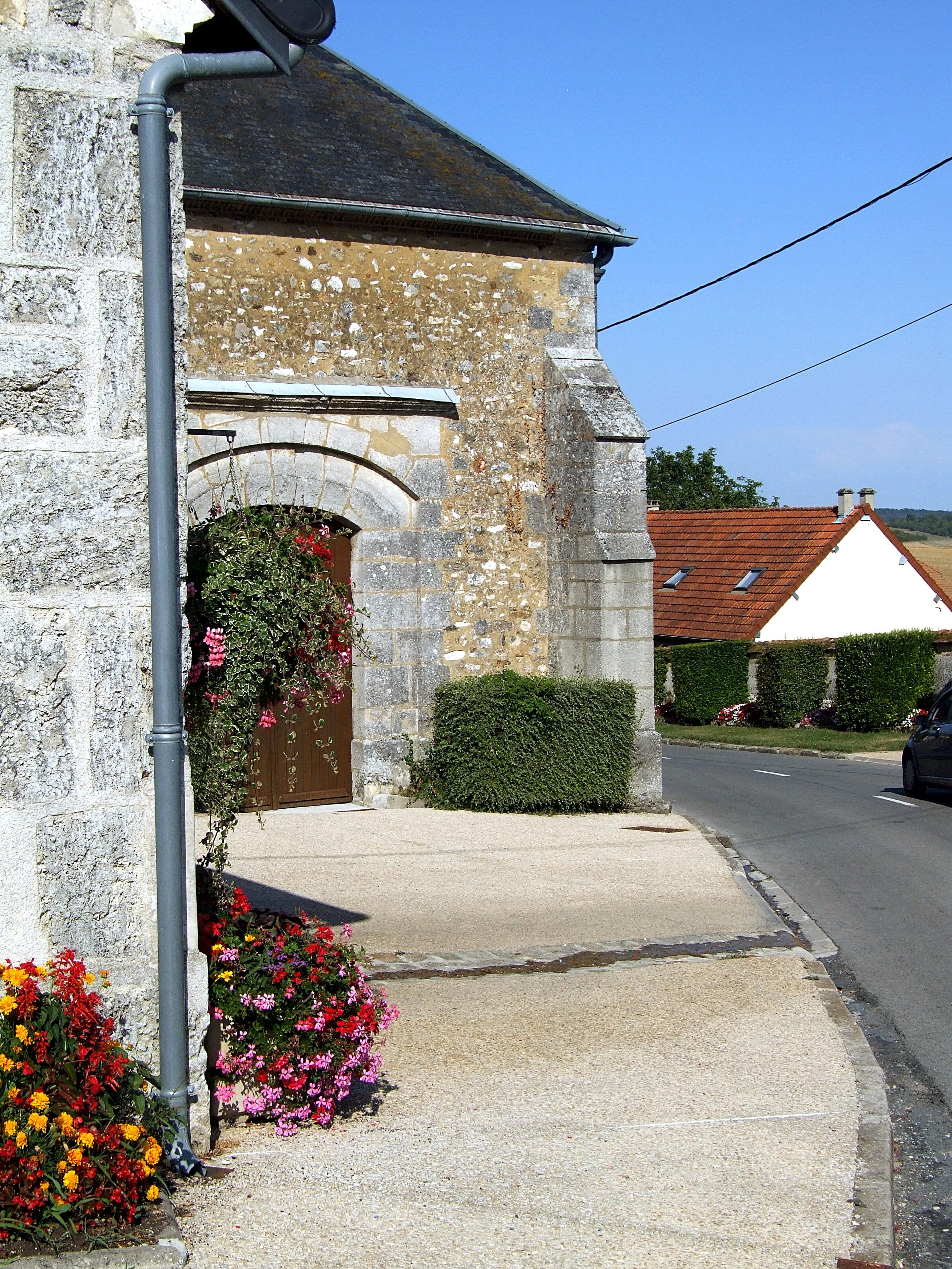 L'église de Givry-lès-Loisy